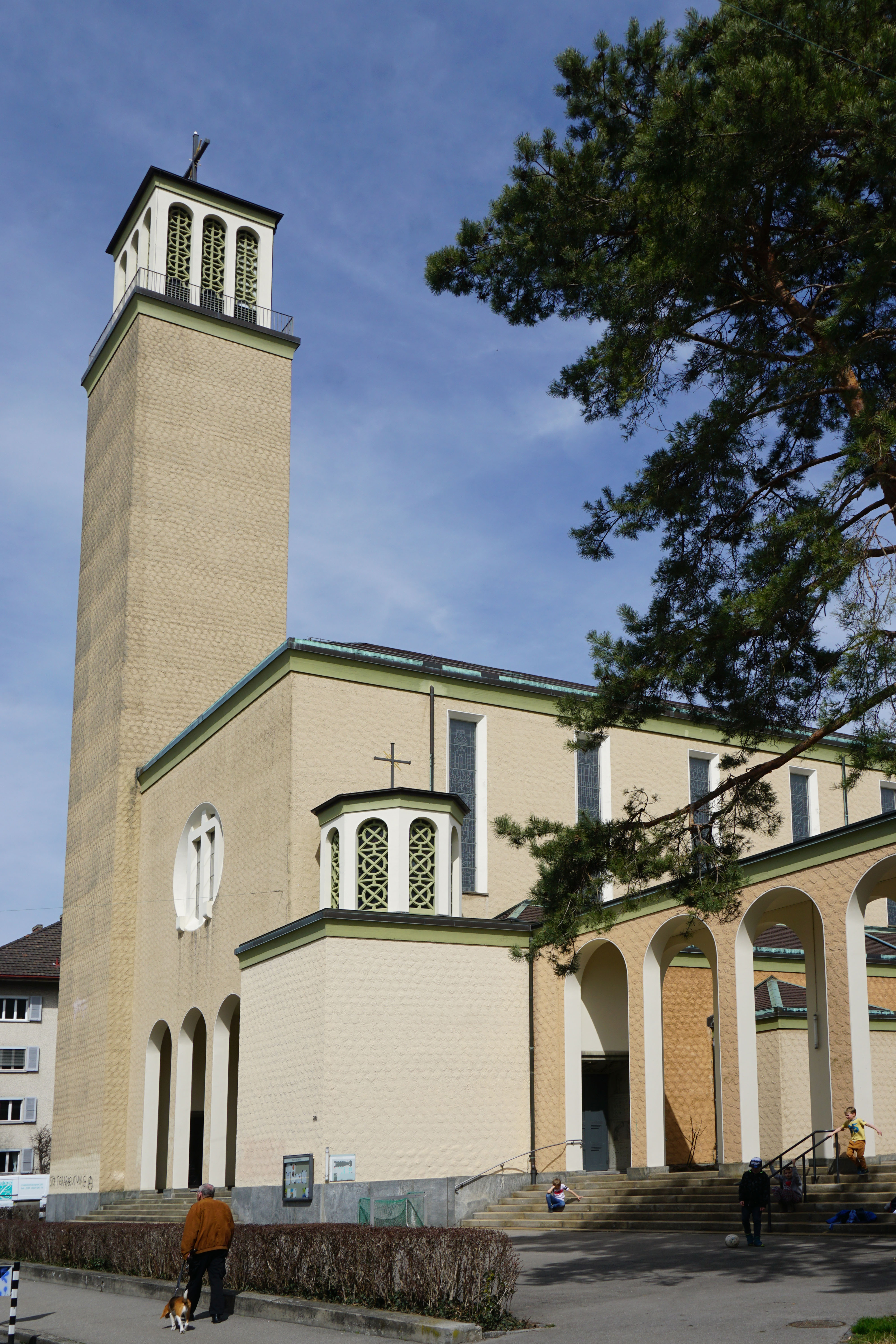 Marienkirche von Südwest